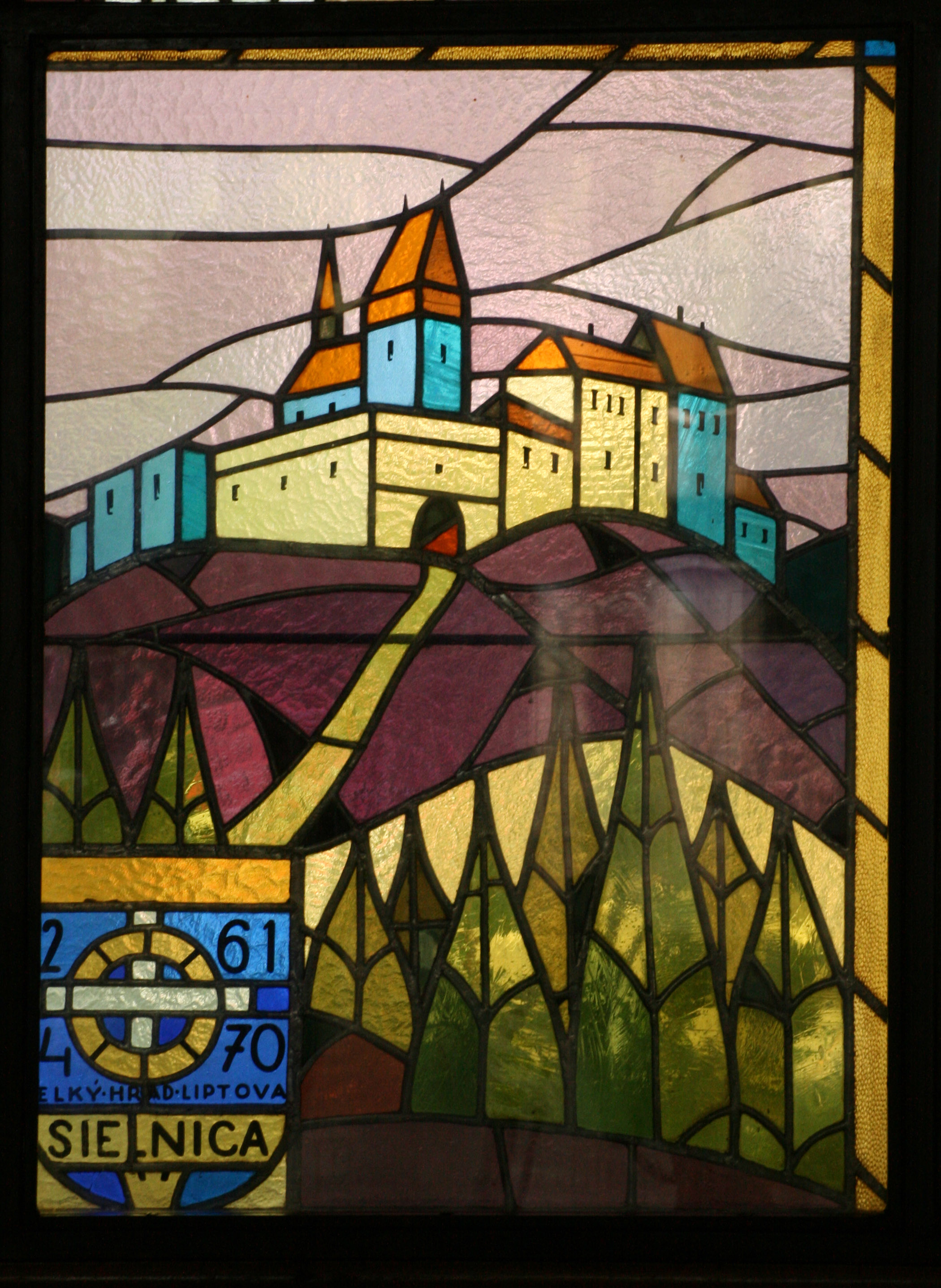 Autorom vitráže v interiéri PKO v Bratislave v roku 1957 bol národný umelec Janko Alexy